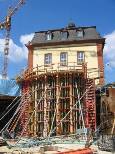 Bauarbeiten im Zuge des Schlossbergtunnel